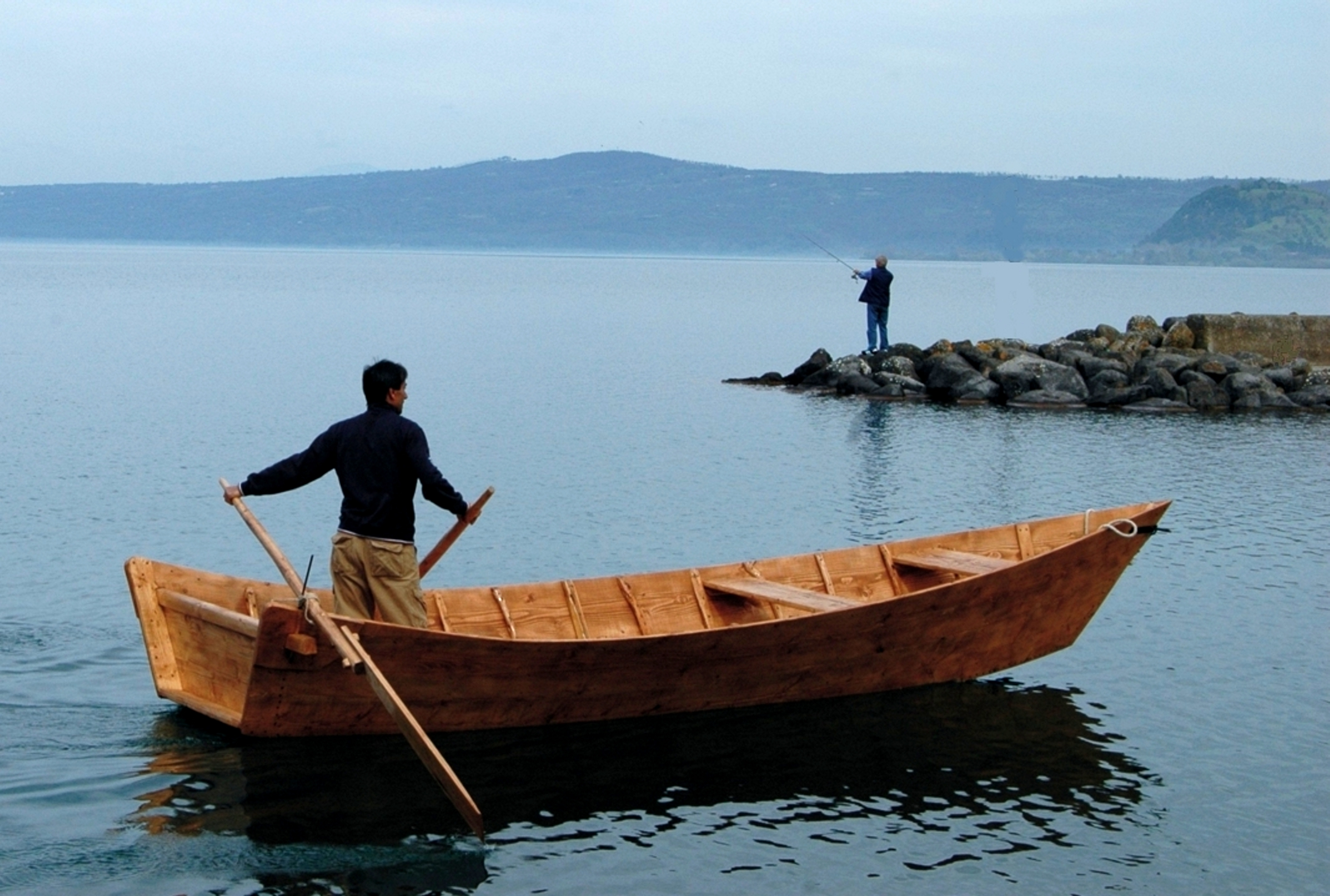 Barca da pesca usata da secoli nel lago di Bolsena e ancora oggi dalla comunità di pescatori di Bolsena e di Marta.